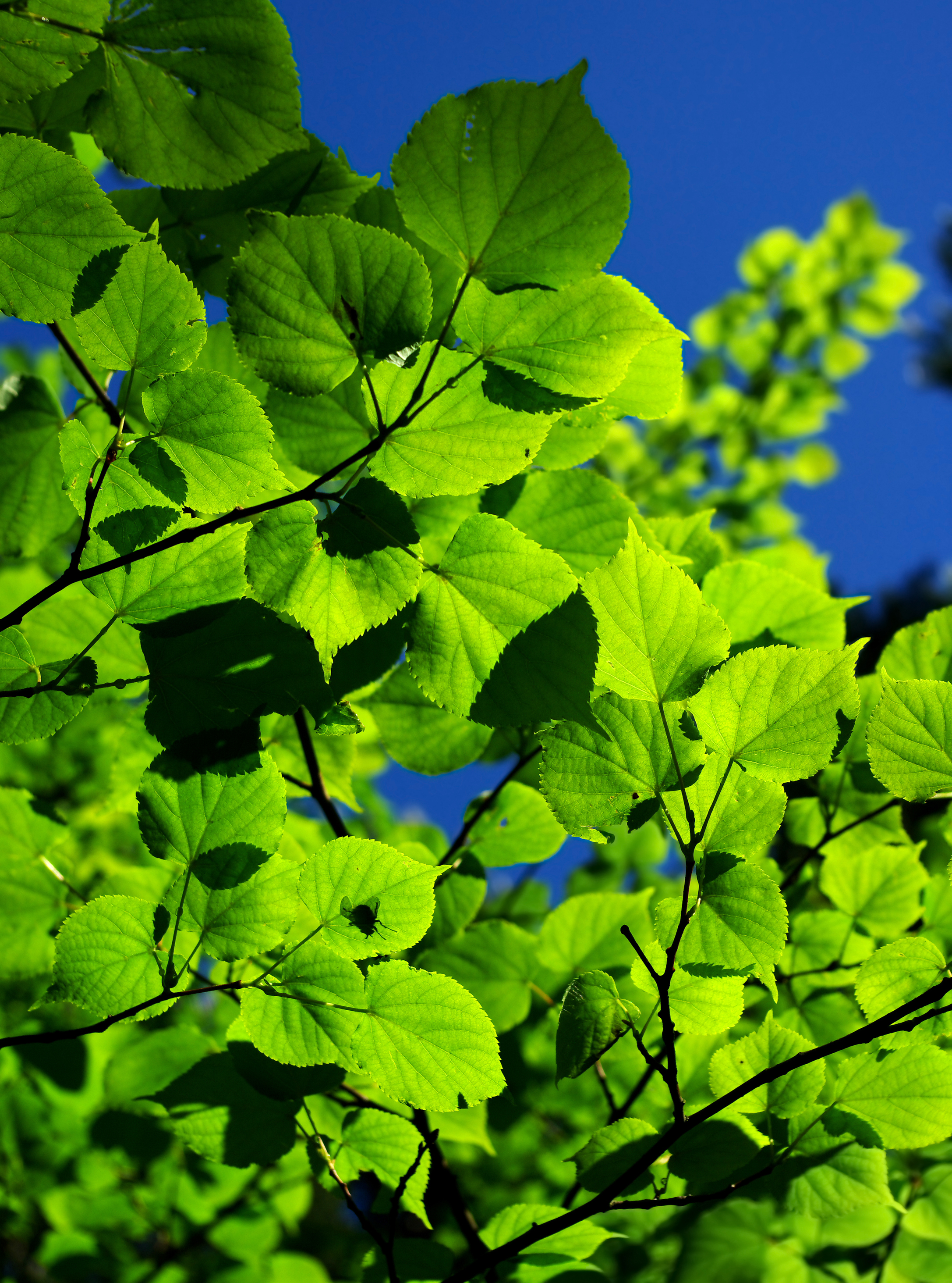 Lipa drobnolistna - liście